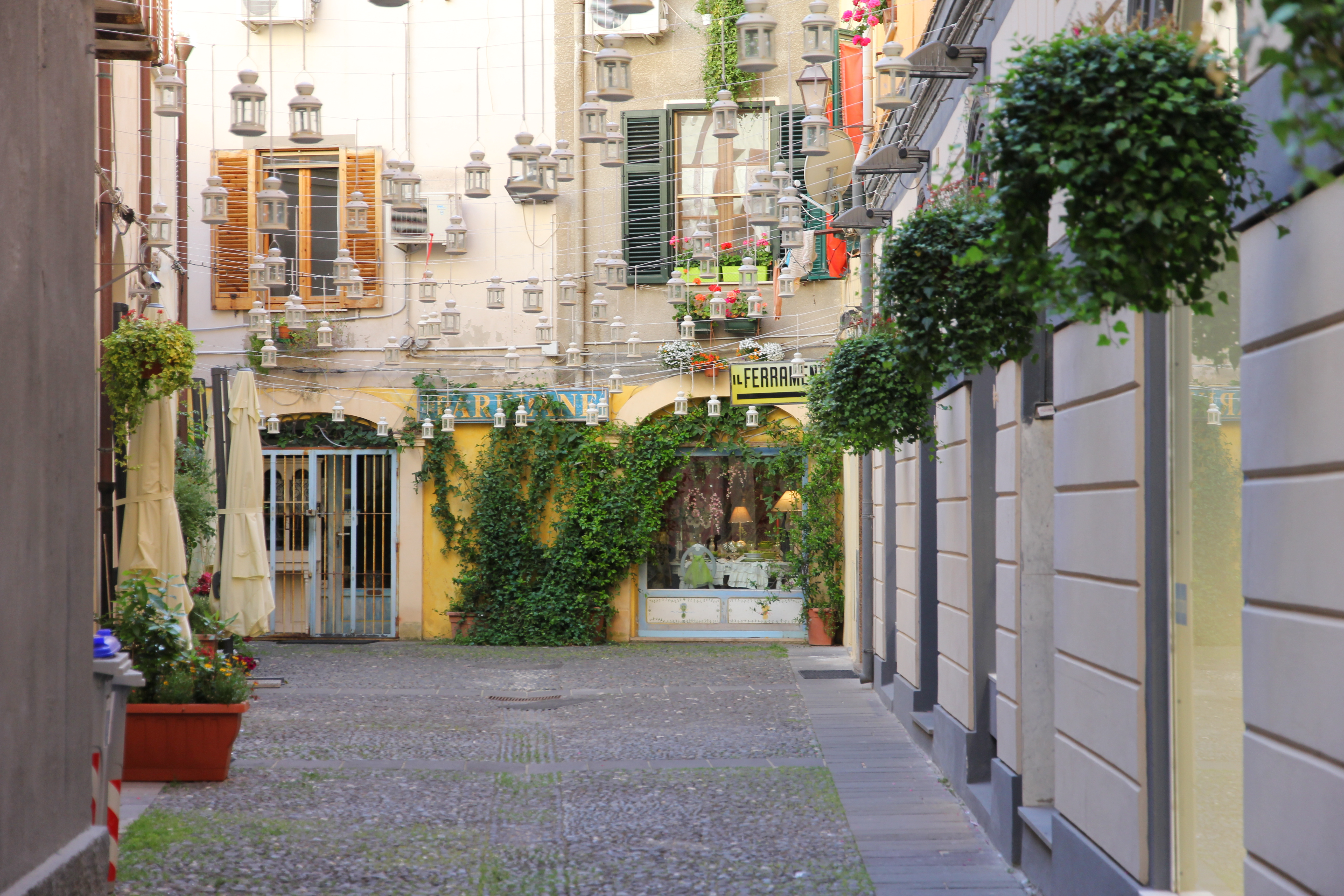 Sassari - Vicolo chiuso via Luzzati